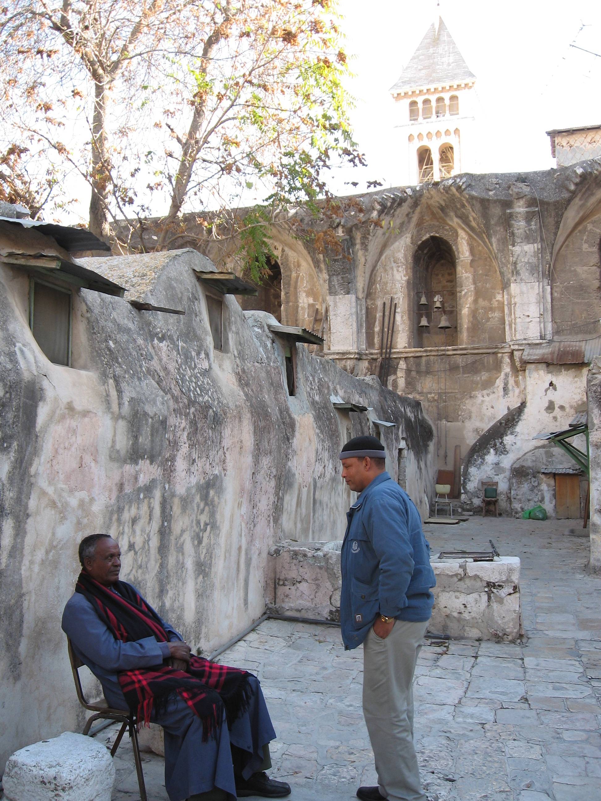 Äthiopische Mönche auf dem Dach der Grabeskirche